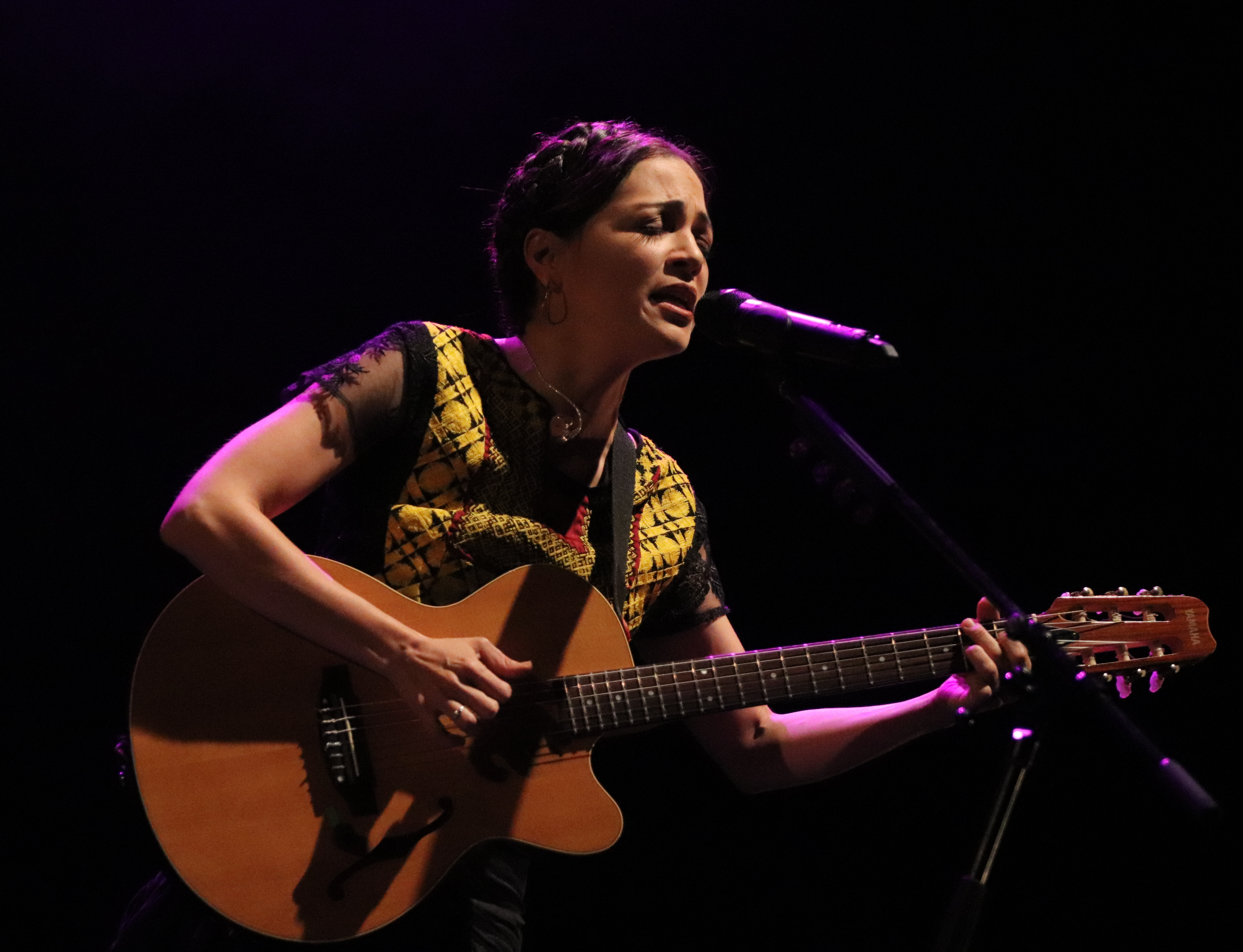 Recital de Natalia Lafourcade el 26 de Abril de 2018 en el Gran Rex